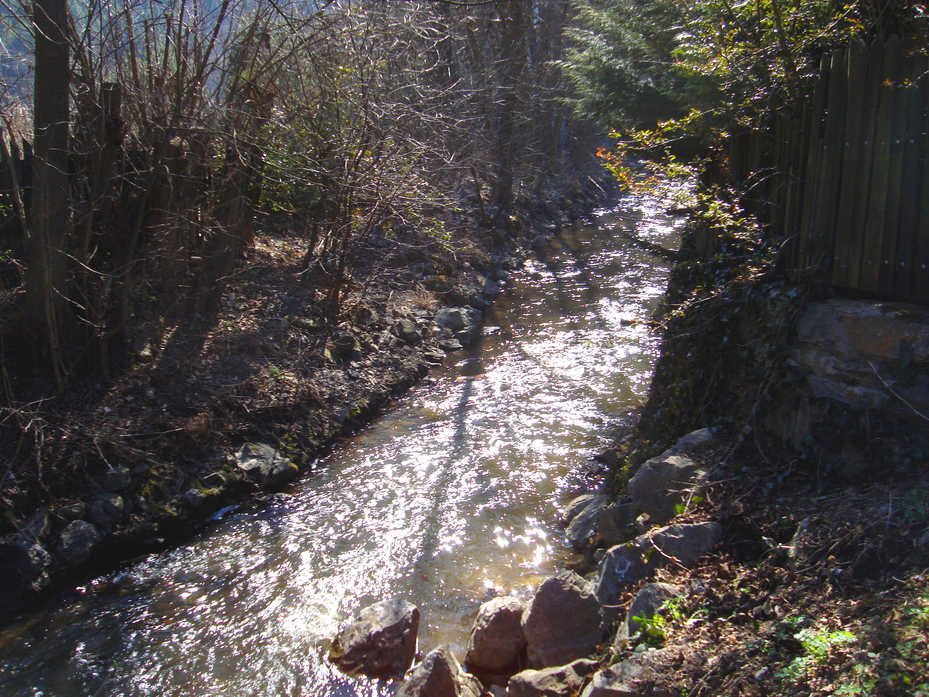 Javůrek - Šmelcovna, Bílý potok